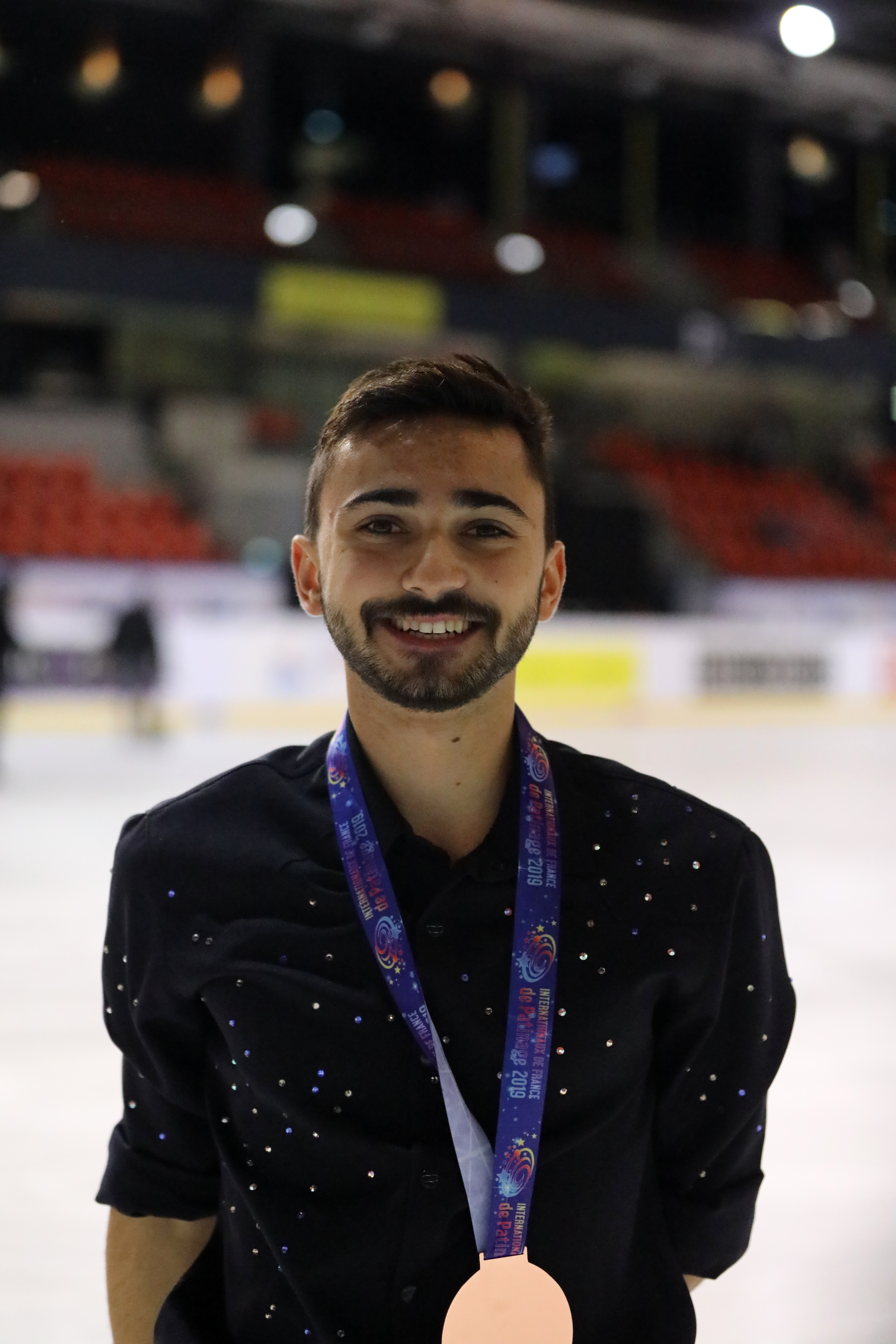 Kevin Aymoz aux Internationaux de France 2019